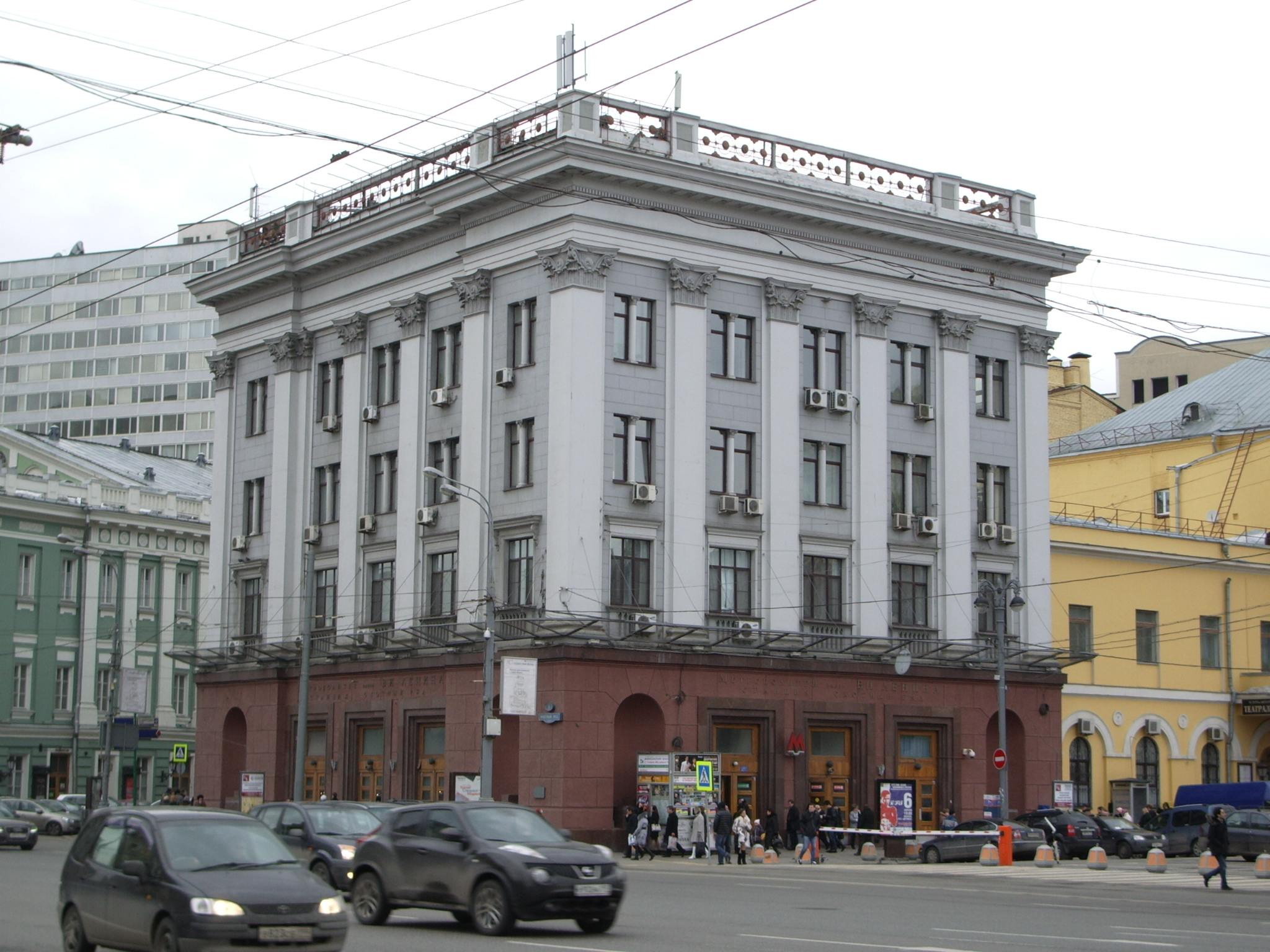 Совместный вестибюль станций метро «Охотный ряд» и «Театральная», встроенный в старый дом.